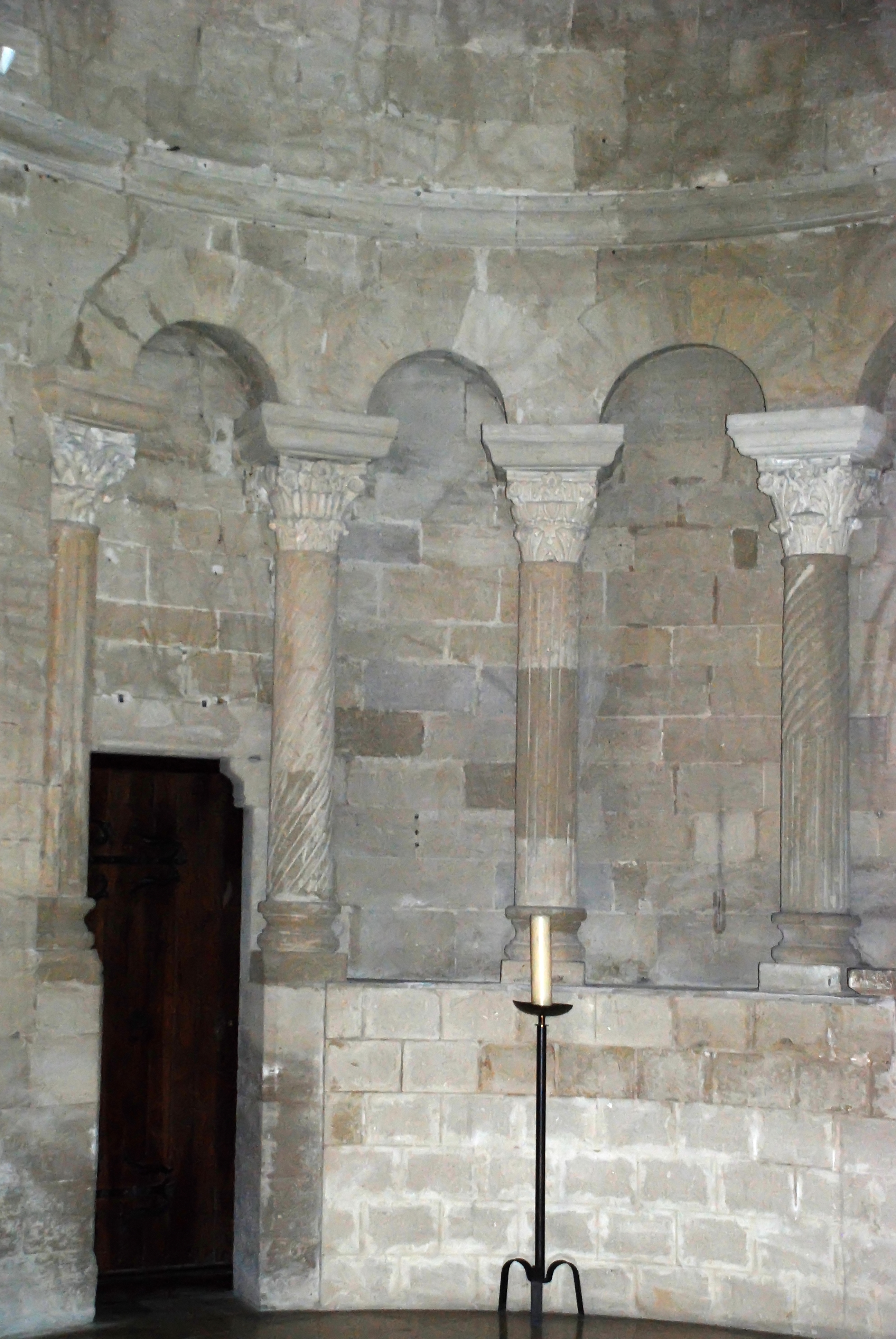 France - Provence - Église Notre-Dame-de-Grâce de Graveson